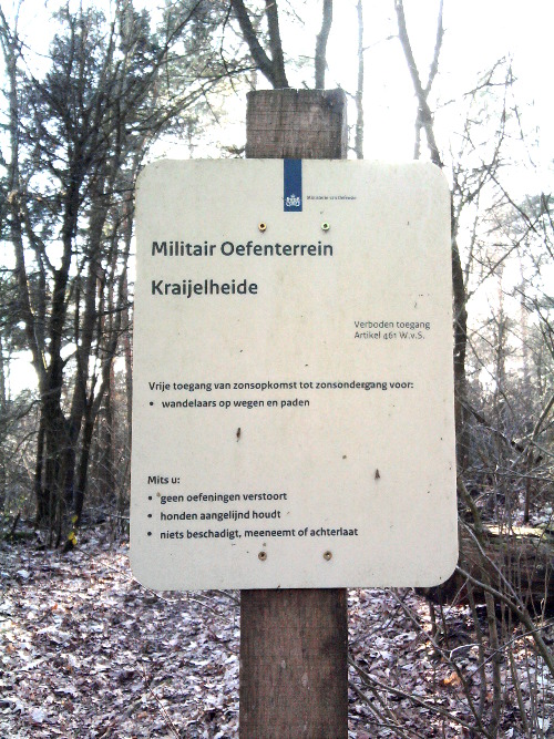 Deze borden staan aan de toegangswegen van het gebied.